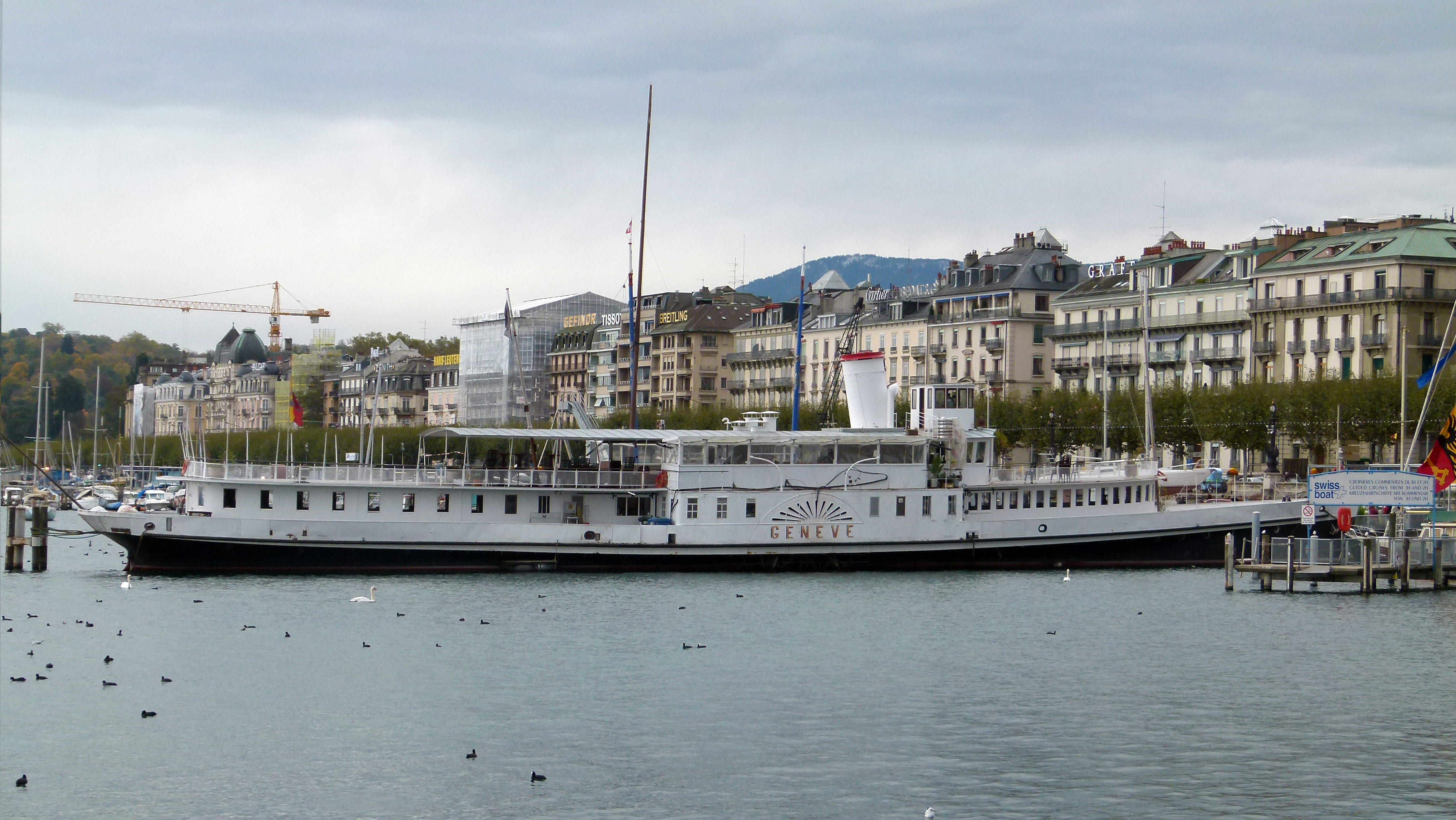 Schiff "Geneve" auf dem Genfer See